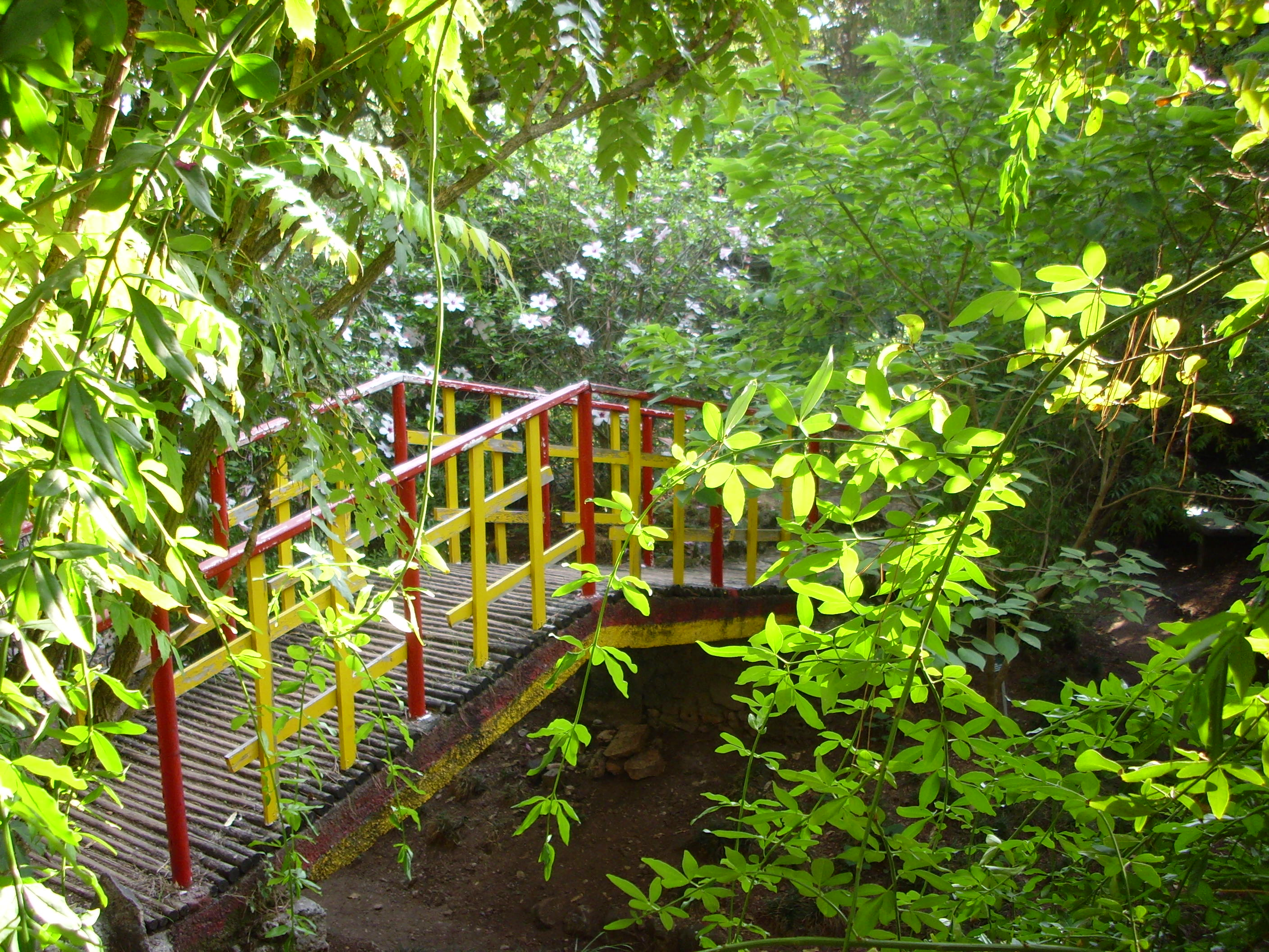 Jardim Botânico - Lisboa